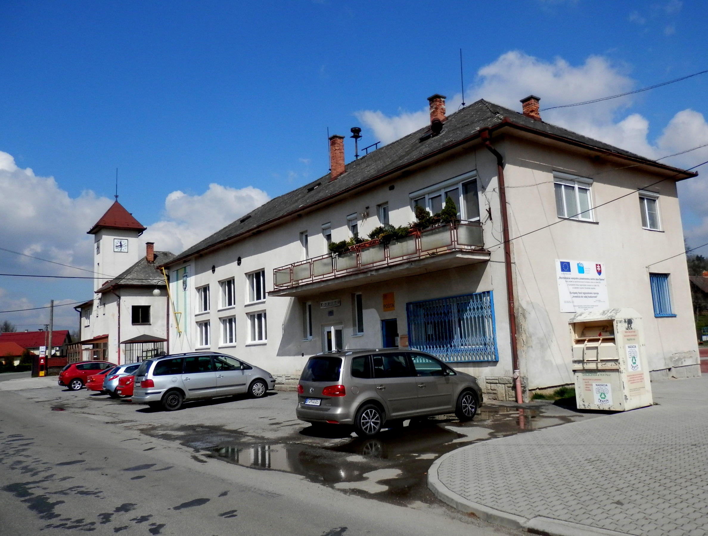 Obecný úrad Bzenov, okres Prešov.